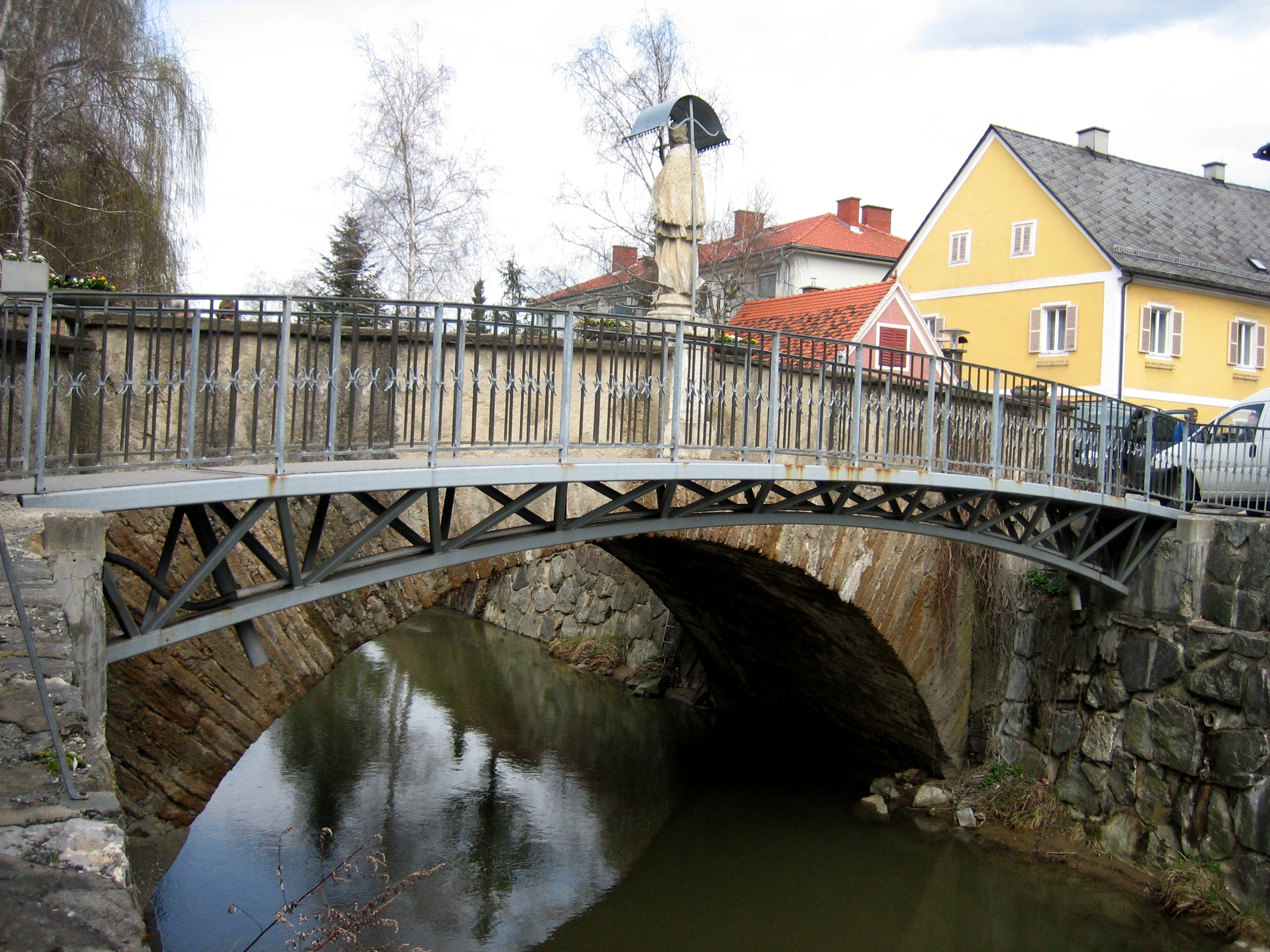 Straßenbrücke mit Figurenbildstock hl. Johannes Nepomuk